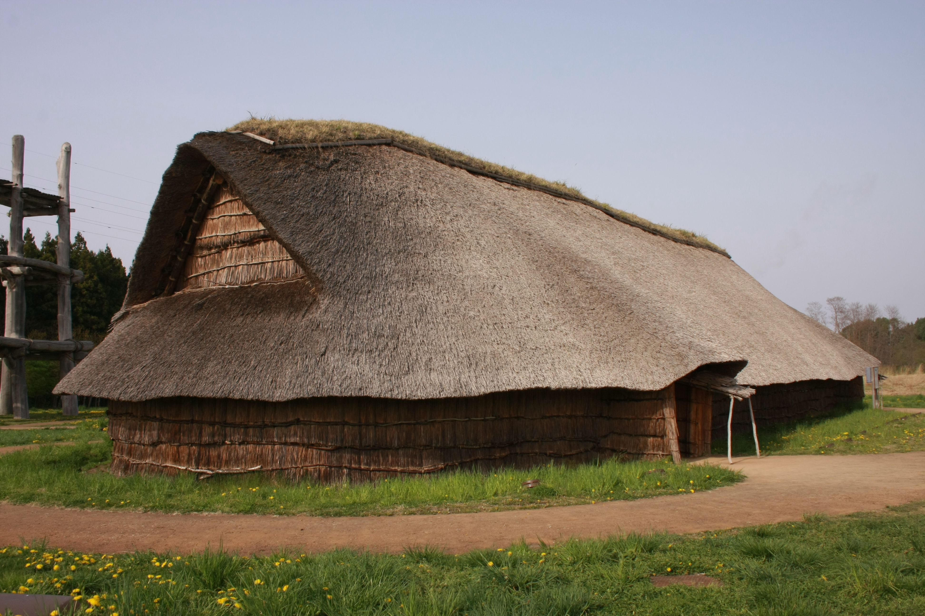 三内丸山遺跡大型竪穴住居